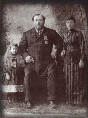 Louis Cyr avec sa femme Mélina Comtois et sa fille Émiliana Cyr